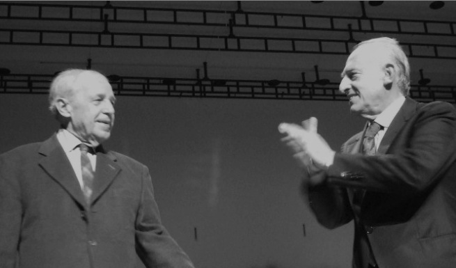 Pierre Boulez et Maurizio Pollini, 25 janvier 2009, Salle Pleyel (Paris)